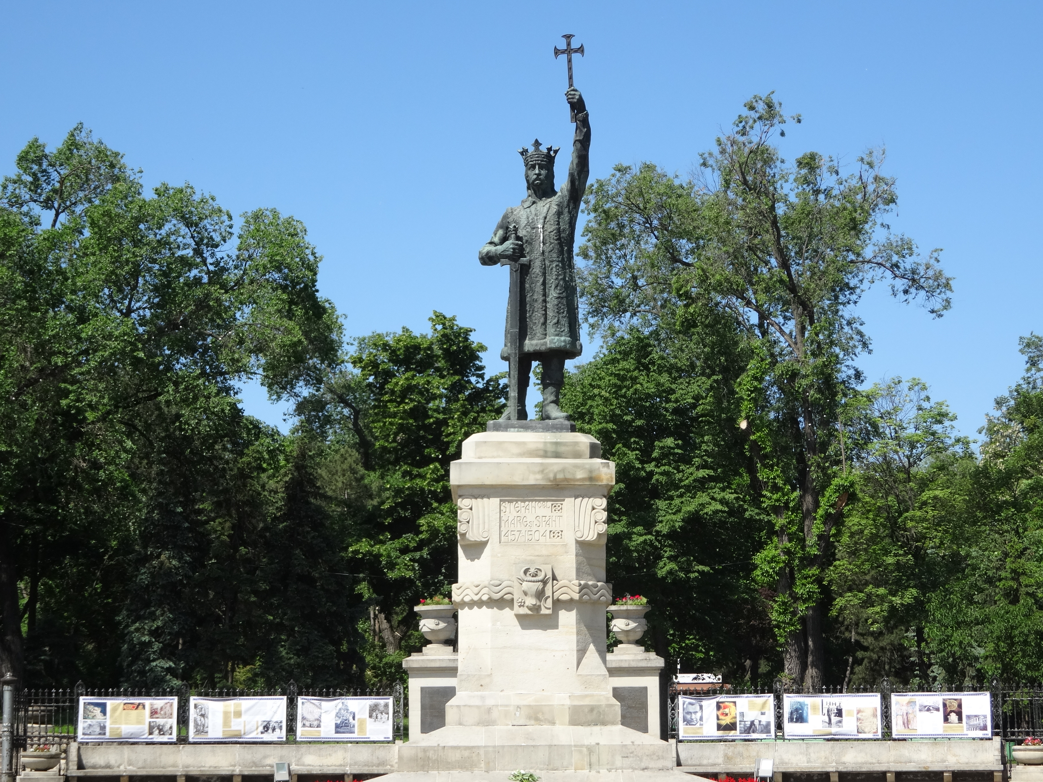 Ștefan cel Mare și Sfînt